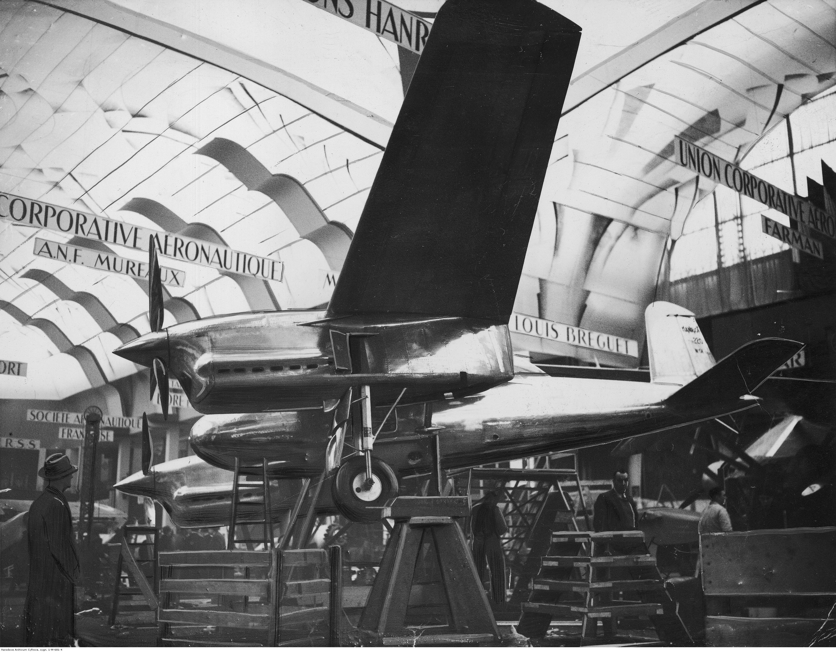 Francuski dwusilnikowy myśliwiec Hanriot H.220 prezentowany na Międzynarodowym Salonie Lotniczym w Paryżu.